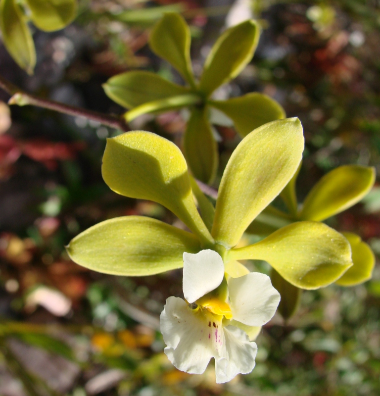 Encyclia alboxanthina Fowlie - ORCHIDACEAE - Parque Natural Municipal Morro do Pai Inácio - Palmeiras - Bahia - Brasil.